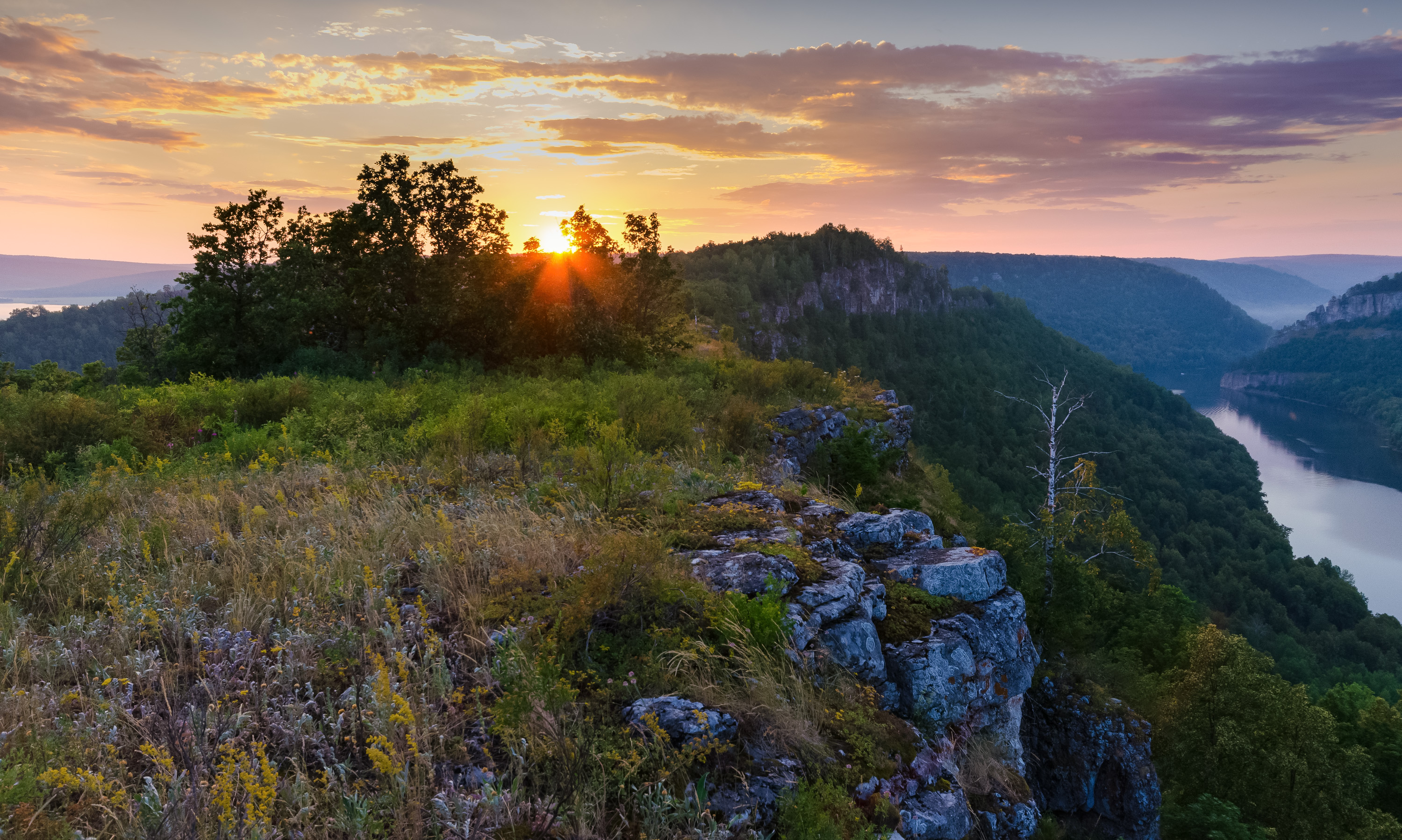 Аккаваз на закате